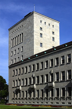 "Winterthur" in Winterthur (Nr. 03.1-5423)